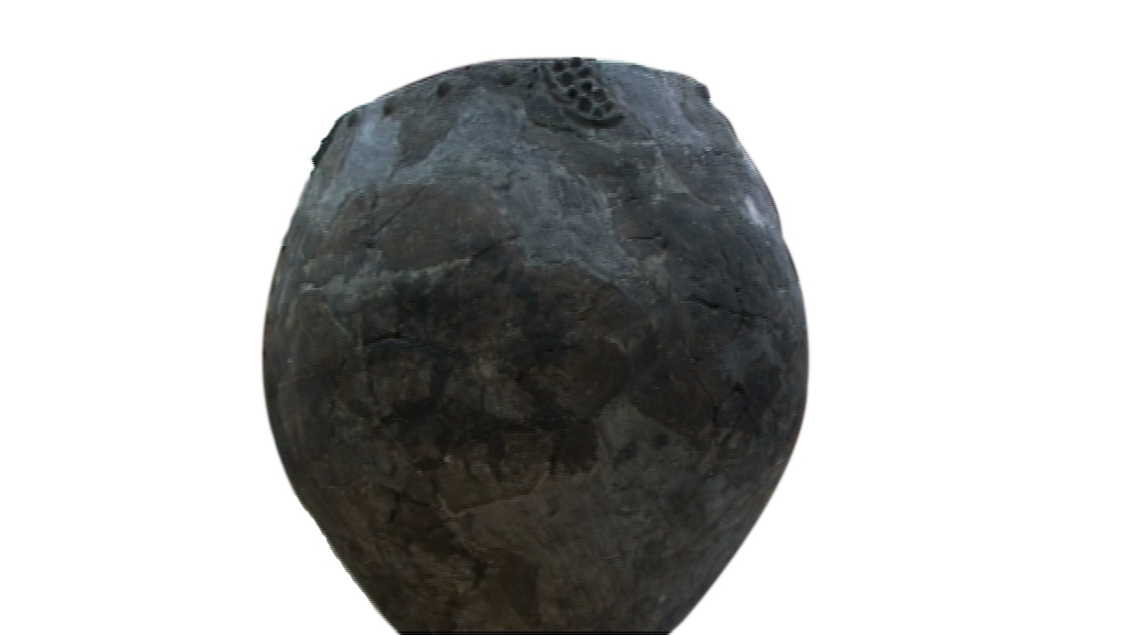 Découvert à Shulaveri en Géorgie, il est daté du VIème millénaire. Musée national de Tbilissi.